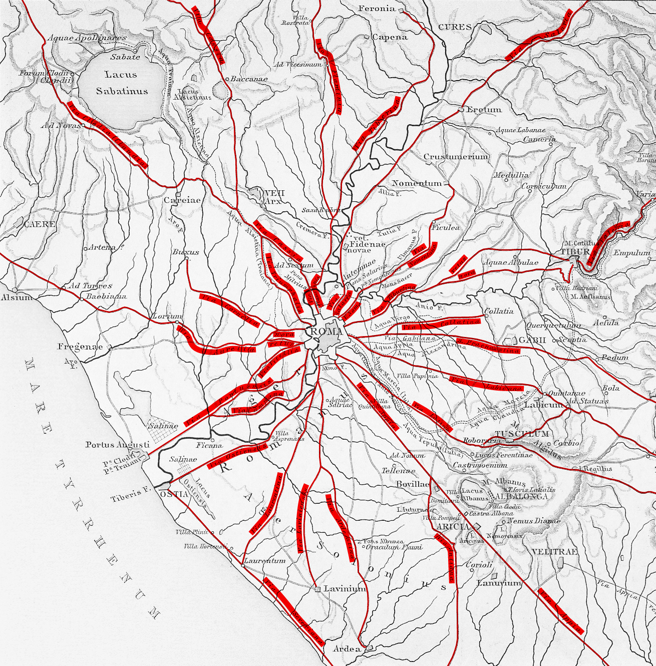 Römerstraßen rund um Rom nach G. Droysens Allgemeiner Historischer Handatlas